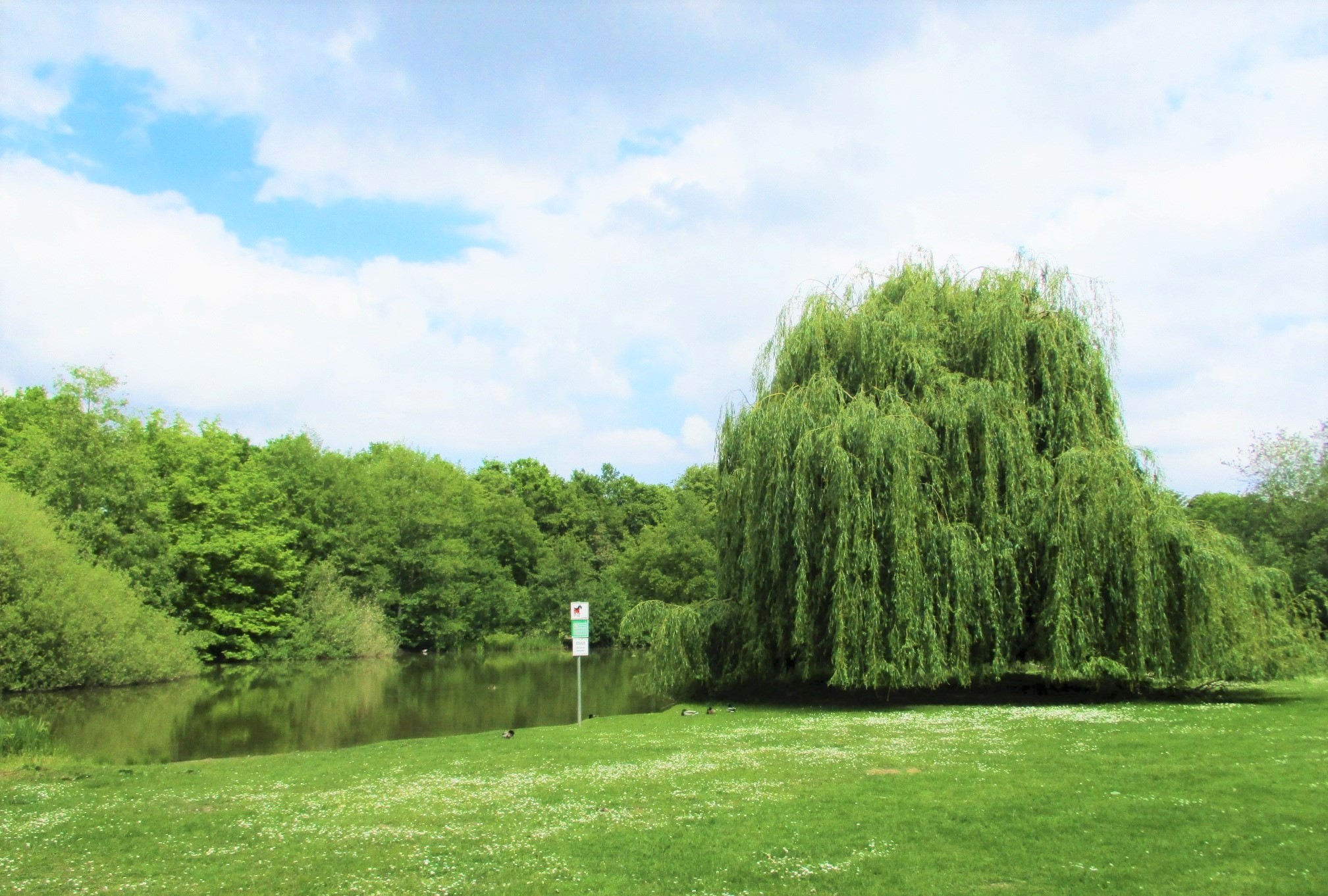 Martin-Luther-King-Park, Frankfurt-Niederursel, Weiher in der Mitte des Parks